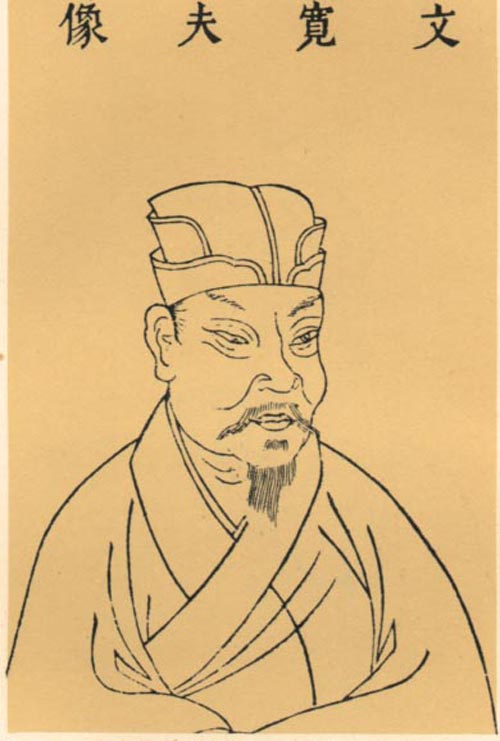 文彦博像取自明代王圻辑，万历时刻《三才图会》